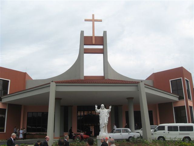 Capilla del Seminario interdiocesano de la Habana: San Carlos y San Ambrosio.